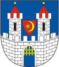 Městský znak Loun podle obecně závazné vyhlášky města č. 2/2018 „O symbolech a čestném občanství města Loun“ (dříve OZV „O symbolice a udělování poct města Loun“ 5/2005), uvedený v příloze obou vyhlášek jako vzor.